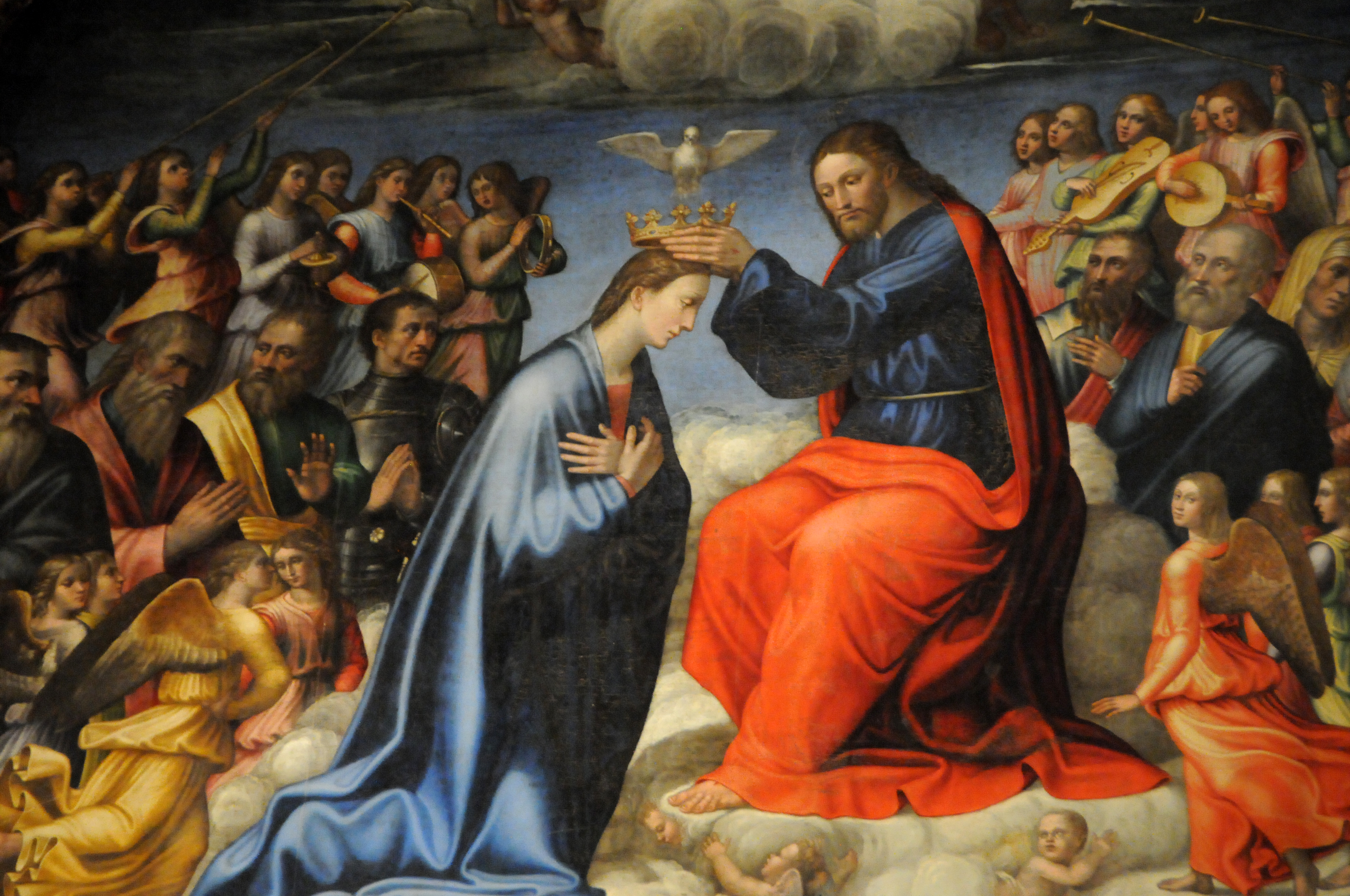 All`interno dell’Ex Chiesa di San Francesco si conservava fino a oggi la maestosa pala con l’Incoronazione della Vergine eseguita da Jacopo Siculo (1541) per la ex chiesa nursina dell’Annunziata Nuova dei Minori Osservanti.